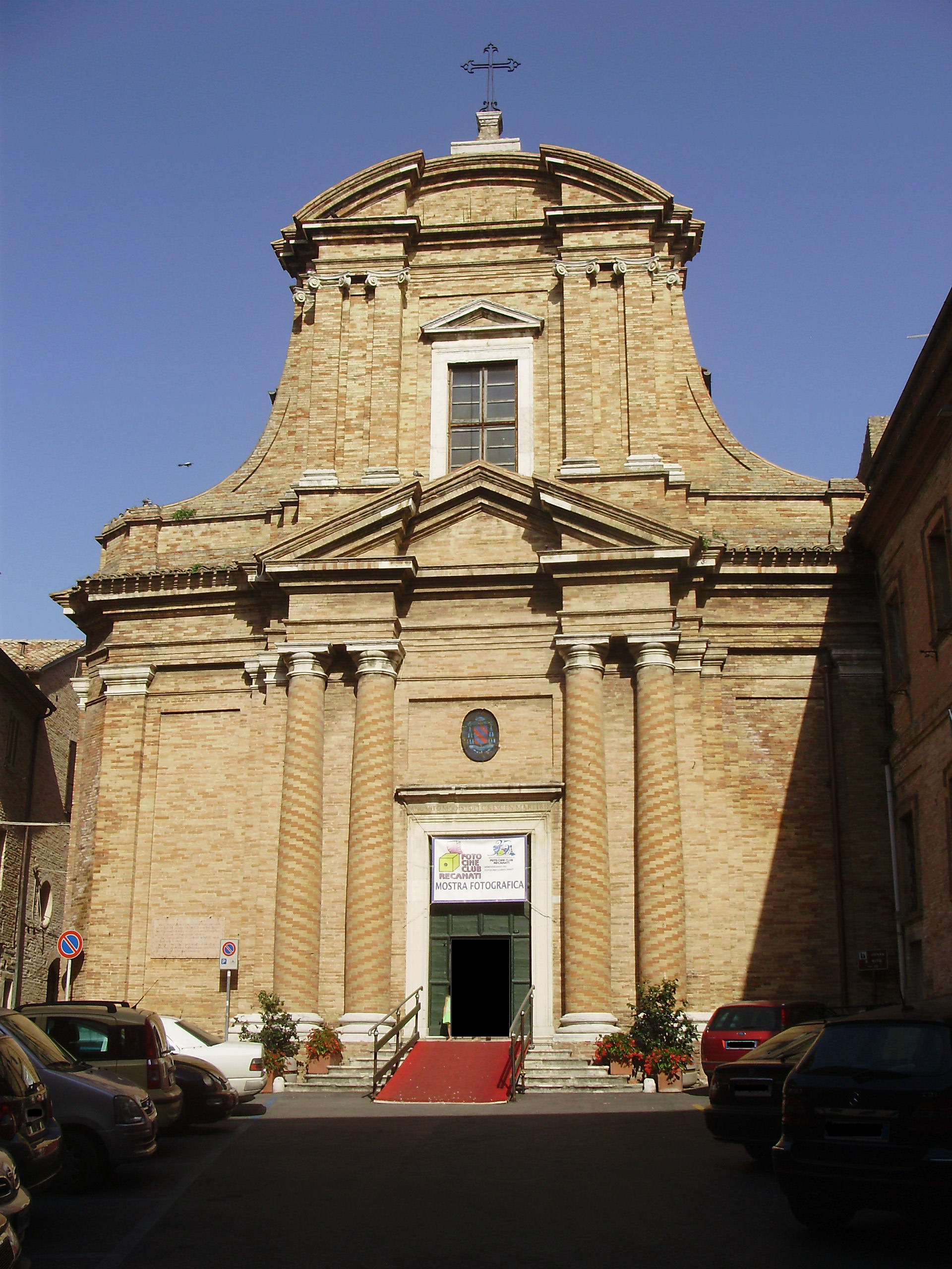 Recanati, chiesa di San Vito: facciata.